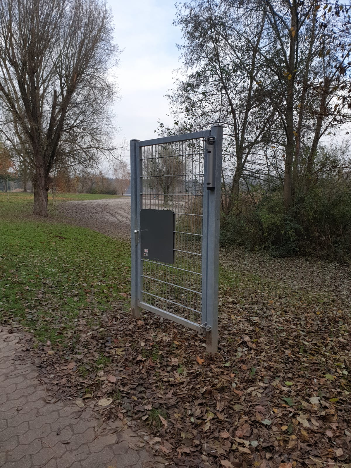 Dieses Bild zeigt eine Sehenswürdigkeit aus Forst (Baden) am Heidesee. Seit einem Jahr befindet sich dort ein Tür, diese hat jedoch keinerlei Nutzen.